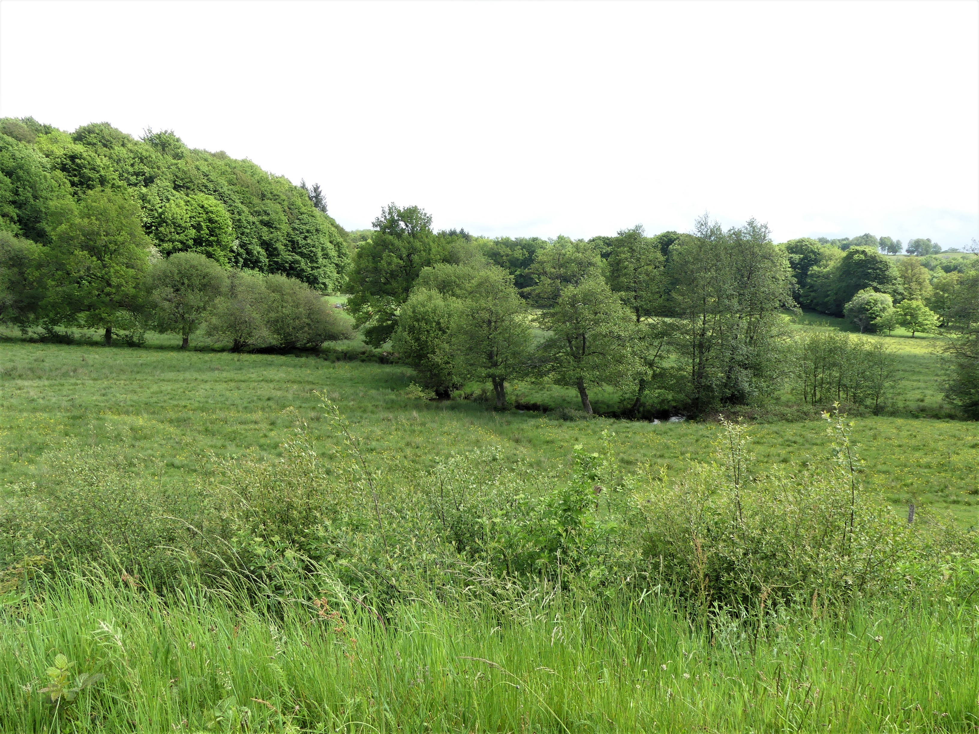 La vallée de la Liège, La Courtine, Creuse, France.